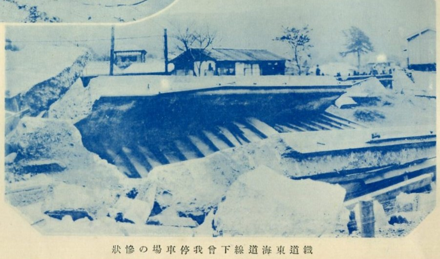 関東大震災当時の下曽我駅の惨状